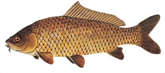 крап риба